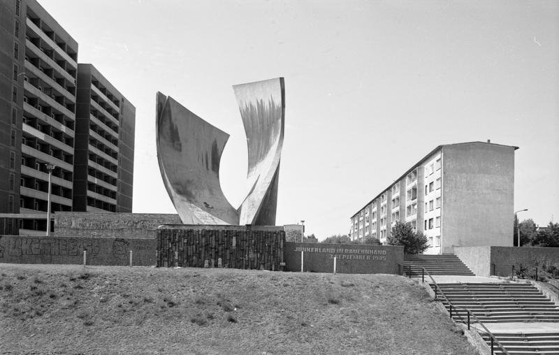 11.-18.8.1991 Bundesland Sachsen-Anhalt Merseburg Denkmal der demokratischen Bodenreform